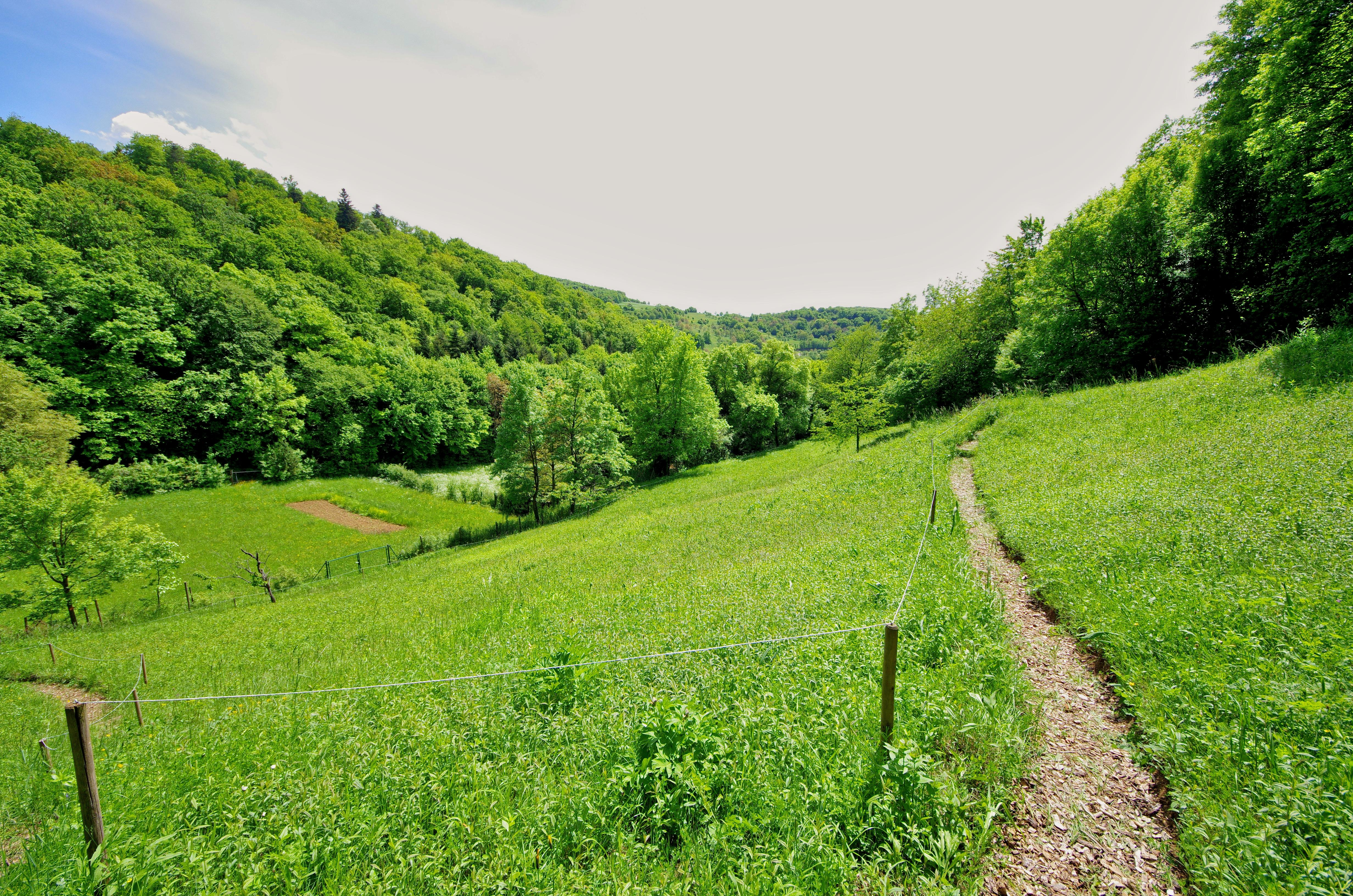 Sumser Garten im Jennetal